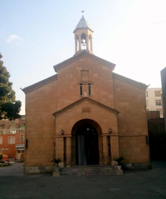 کلیسای حضرت مریم در تهران، خیابان میرزا کوچک خان که در تاریخ ۱۲ بهمن ۱۳۸۱ با شمارهٔ ثبت ۷۲۳۷ در فهرست آثار ملی ایران به ثبت رسیده‌است